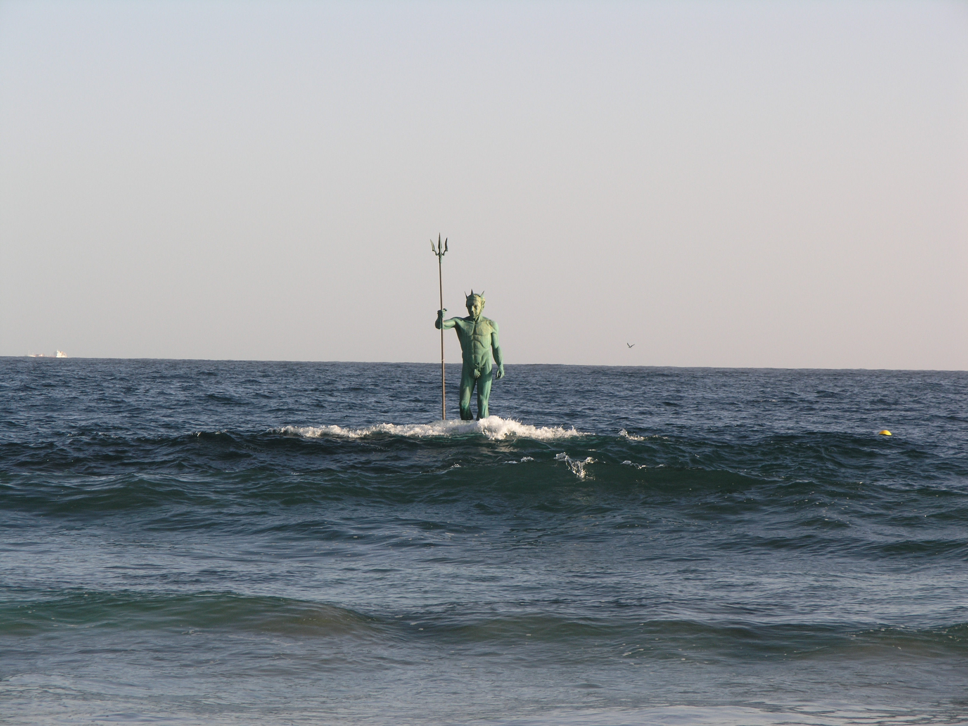 Playa de Melenara - Neptuno